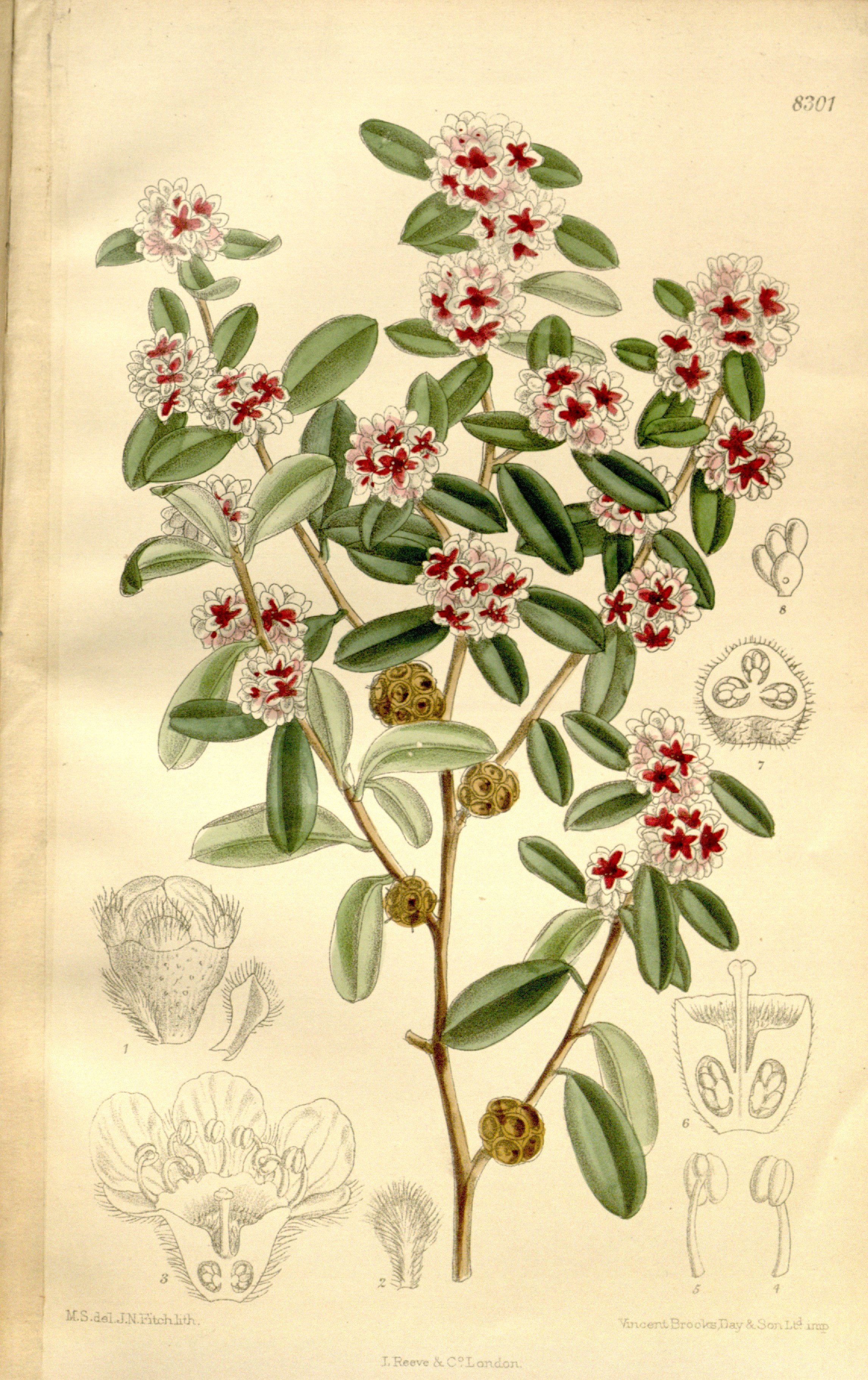 Agonis marginata (= Taxandria marginata), Myrtaceae